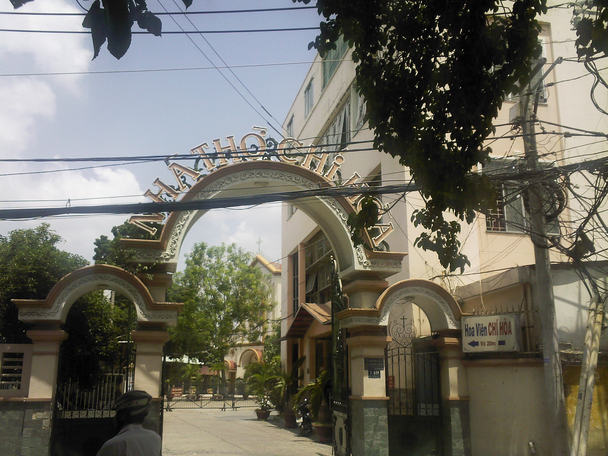 Cổng Nhà thờ Chí Hòa, TPHCM